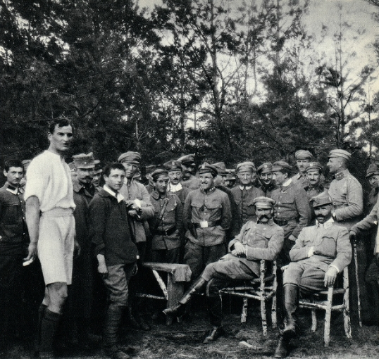 Na zdjęciu widzimy spotkanie Józefa Piłsudskiego z bramkarzami drużyn Białej i Czarnej po meczu piłki nożnej. Mecz odbył się pod Optową z okazji święta 4 pułku piechoty LP. Obok Piłsudskiego siedzi płk. Roja - dowódca 4 pp.